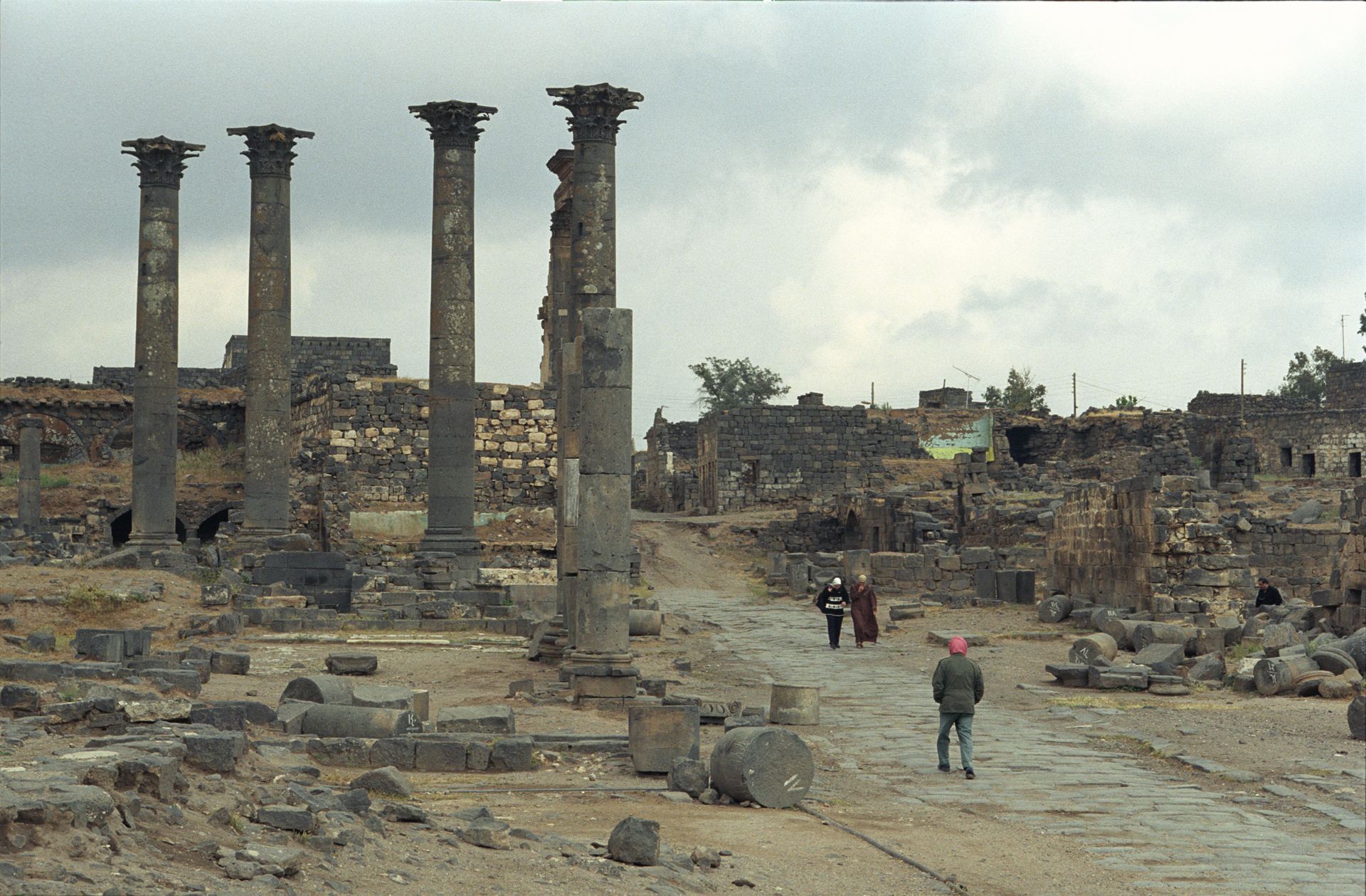 Syria, Bosra